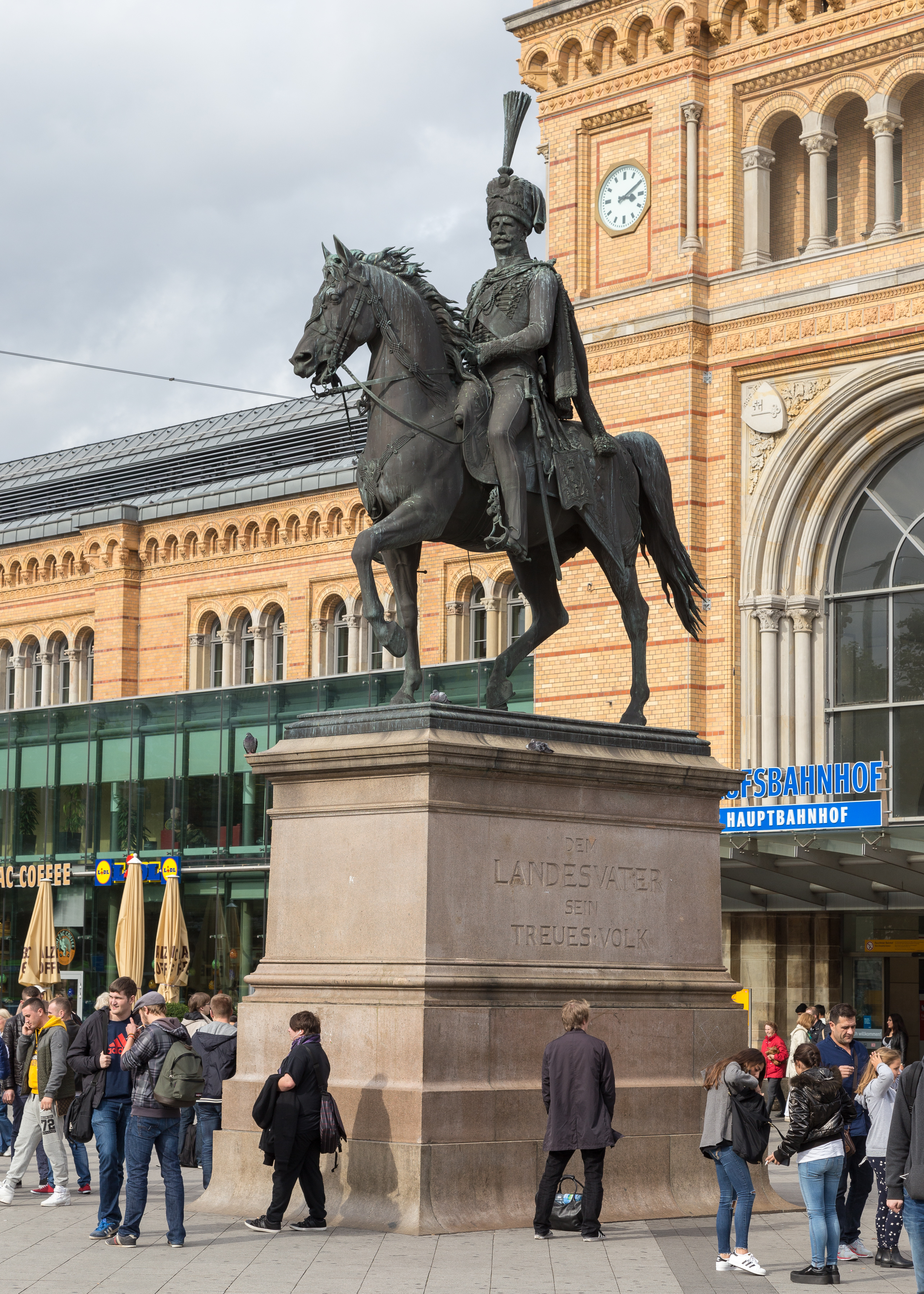 Ernst-August-Denkmal vor dem Hauptbahnhof Hannover: Der Landesvater mit seinem treuen Volk zu Füßen